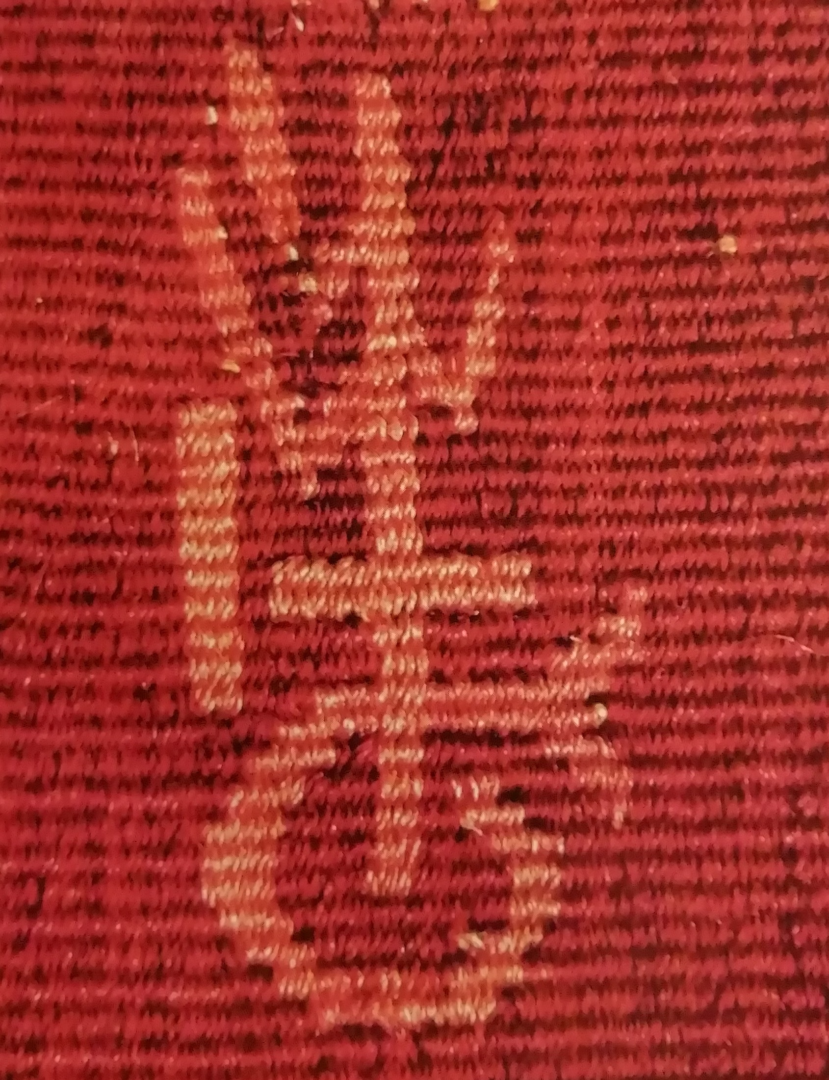 Monogramma presente su uno degli Arazzi della Battaglia di Pavia (Napoli, Capodimente) ritenuto marchio di fabbrica della manifattura tessile di William Dermoyen sita a Bruxelles